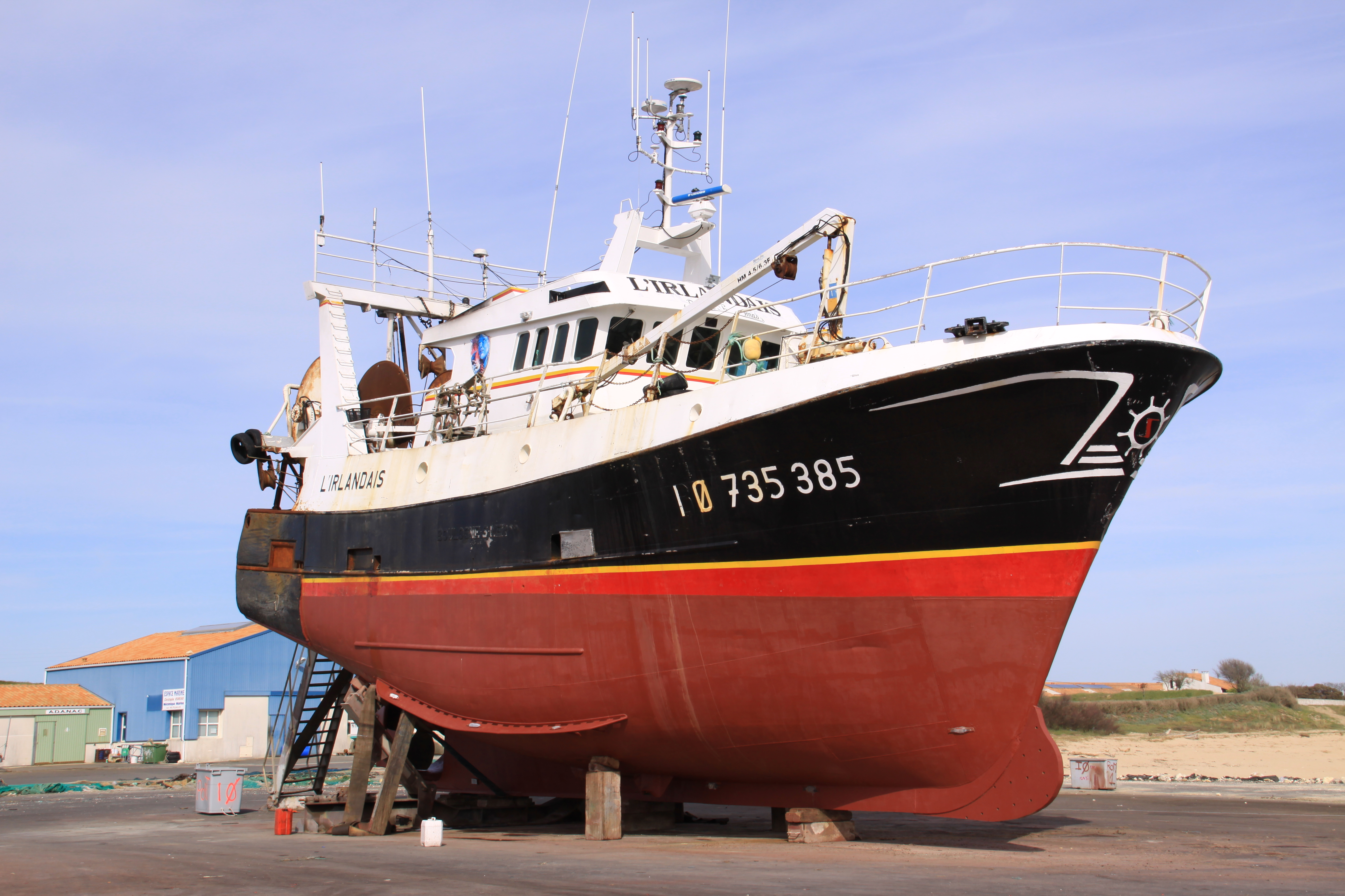 Un chalutier hauturier sur cales pour entretien au port de La Cotinière. Ce bateau en métal s' appelle "L' Irlandais". Il a été construit en 1990 par la Socarenam. Il mesure 19,50 mètres de longueur et 8,73 de largeur. L'instrument du pêche utilisé est un chalut de fond à panneaux. La Cotinière (Commune de Saint-Pierre d' Oléron), Île d' Oléron, Charente Maritime, France.